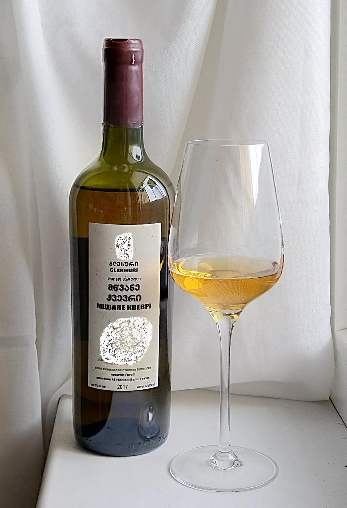 Mtsvane glekhuri Kakhetian wine